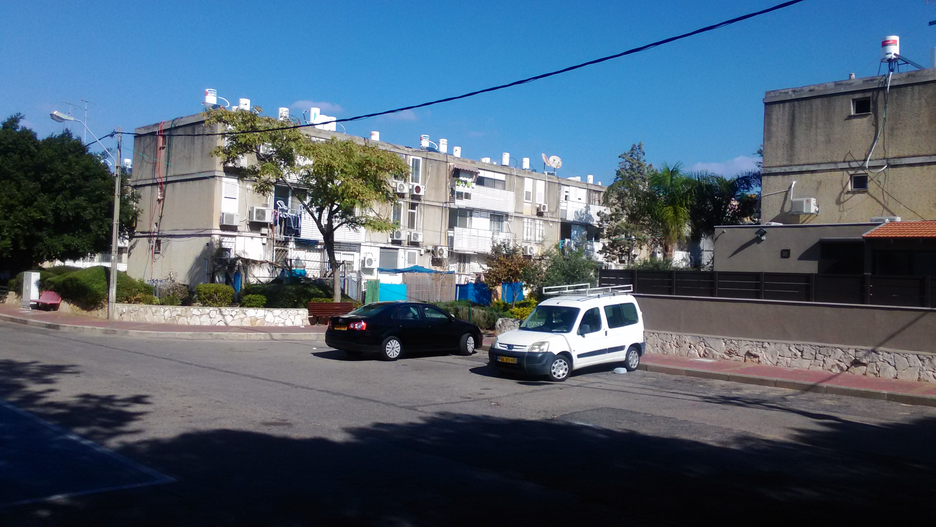 בנייני שיכון בשכונה